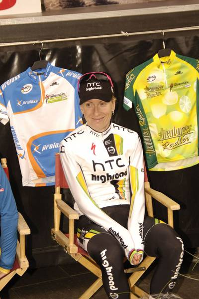 Judith Arndt bei der 4. Etappe Rund um Zeulenroda der Internationalen Thüringen Rundfahrt der Frauen 2011